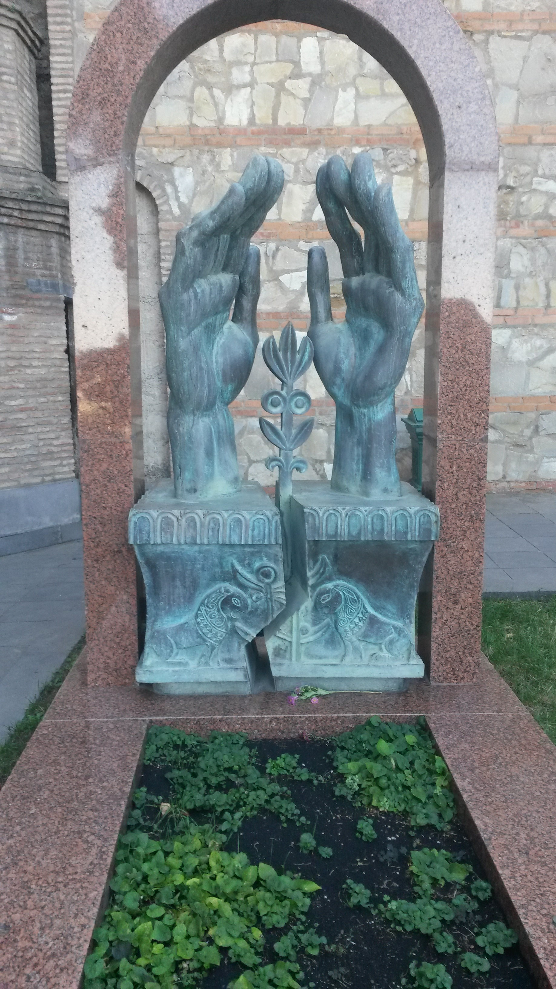 მთაწმინდის პანთეონი